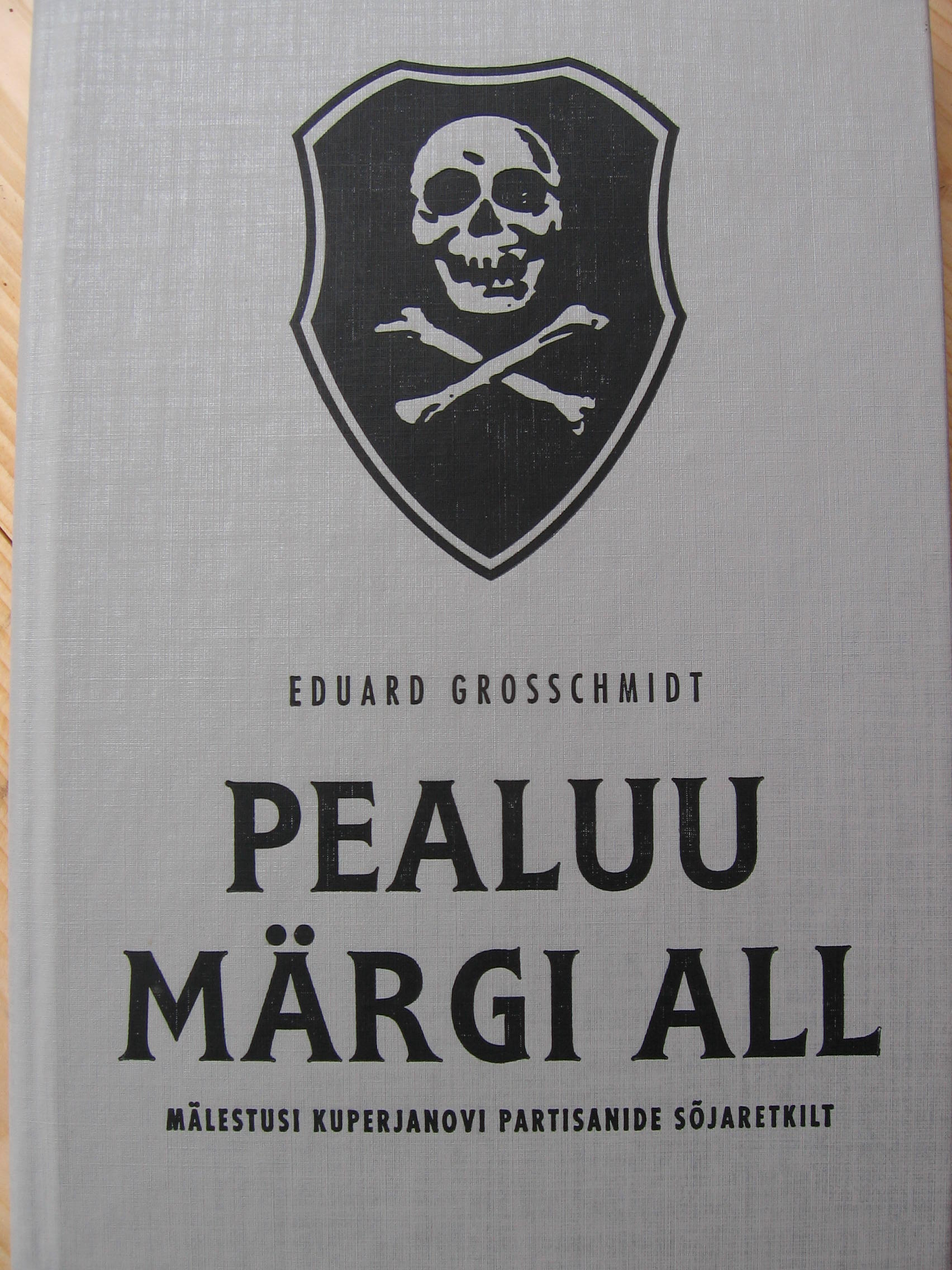 Eduard Grosschmidt, "Pealuu märgi all: mälestusi Kuperjanovi partisanide sõjaretkilt", Tallinn: Mats, 1995